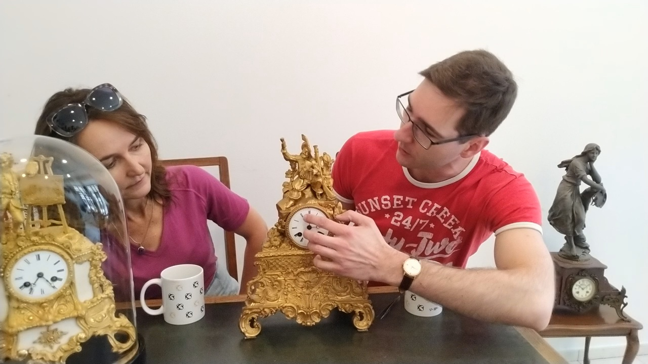 Vzdělávací aktivitity Akademie Mozarteum se zaměřují i na starožitné hodiny